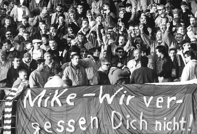 ADN- Bernd Settnik-10.11.90-Berlin: Fußball-Oberliga- FC Berlin - HFC Chemie 0:0 Mit Plakaten und einer Schweigeminute zu Beginn der zweiten Halbzeit gedachten die Zuschauer des am 3. November bei Auseinandersetzung zwischen der Polizei und Hooligans in Leipzig getöteten Mike Polley.